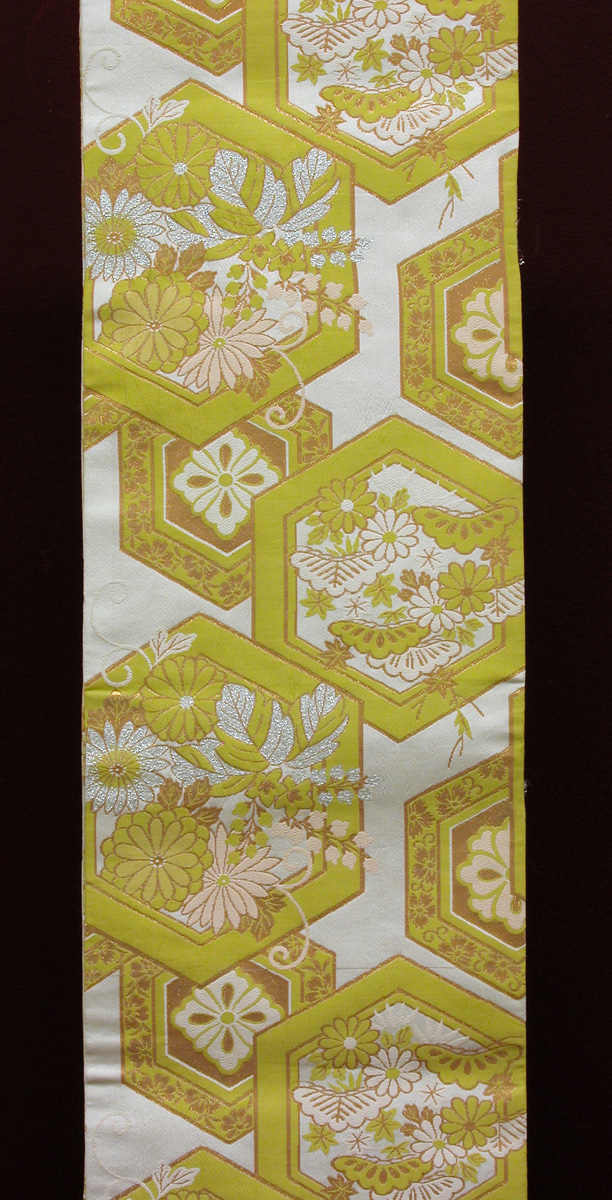 Пояс оби. XХ в. Япония